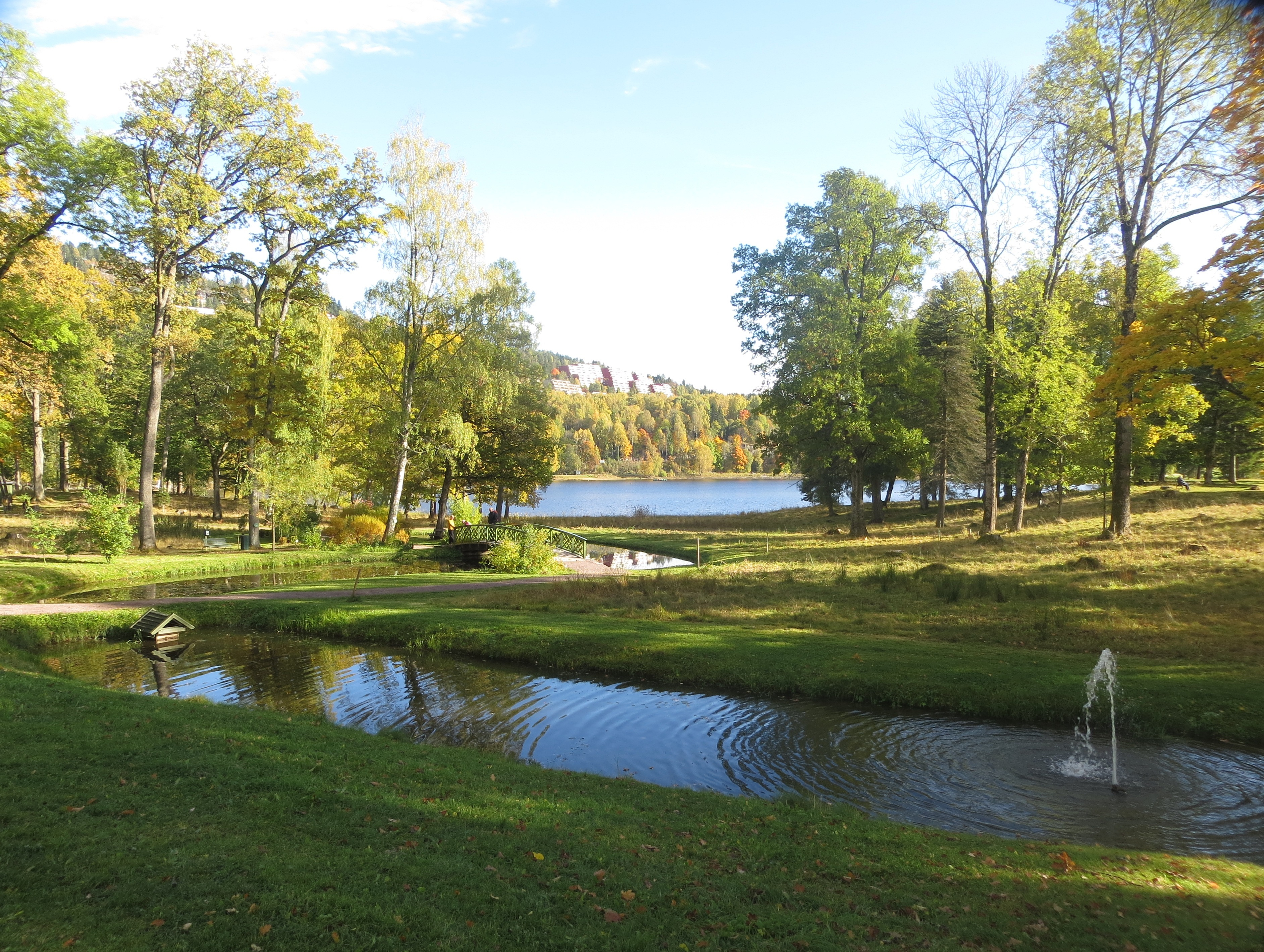 Bogstad gård ved Bogstadvannet nederst i Sørkedalen, Oslo.